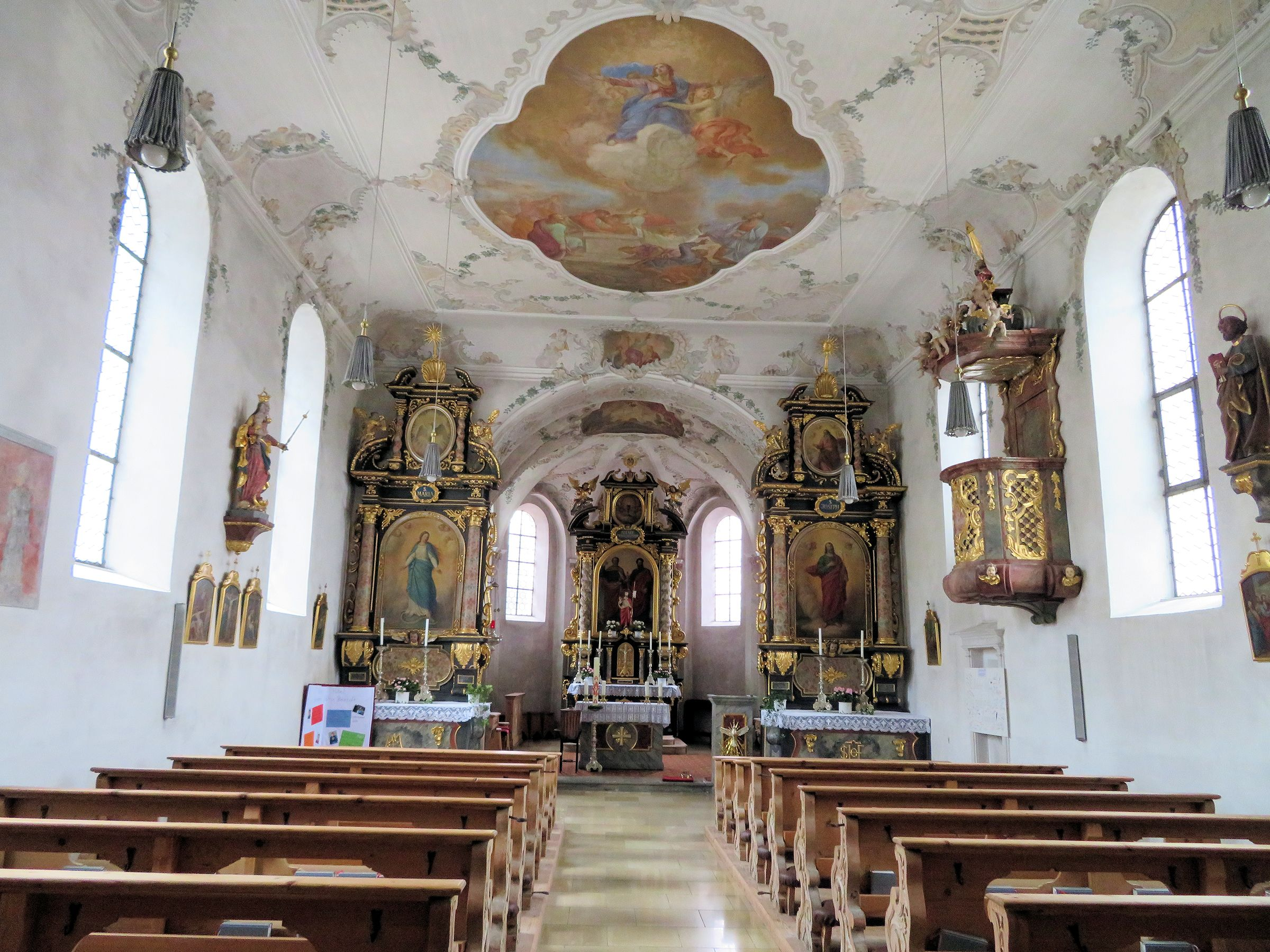 St. Peter und Paul in Hopfen am See ist eine barockisierte Kirche, deren Ursprünge wohl auf das 11. Jh. zurückgehen. Sie enthält gotische Fresken und Malereien von Claudius Schraudolph dem Älteren sowie Stuck von Joseph Fischer aus Faulenbach.